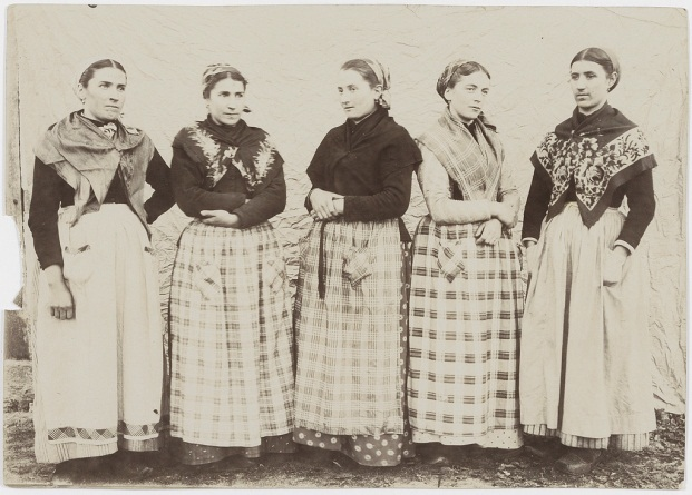 Reproduction numérique d'une épreuve photographique, réalisée par Félix Arnaudin, sur papier photographique, selon la technique du positif (tirage argentique), 11,9x17 cm.